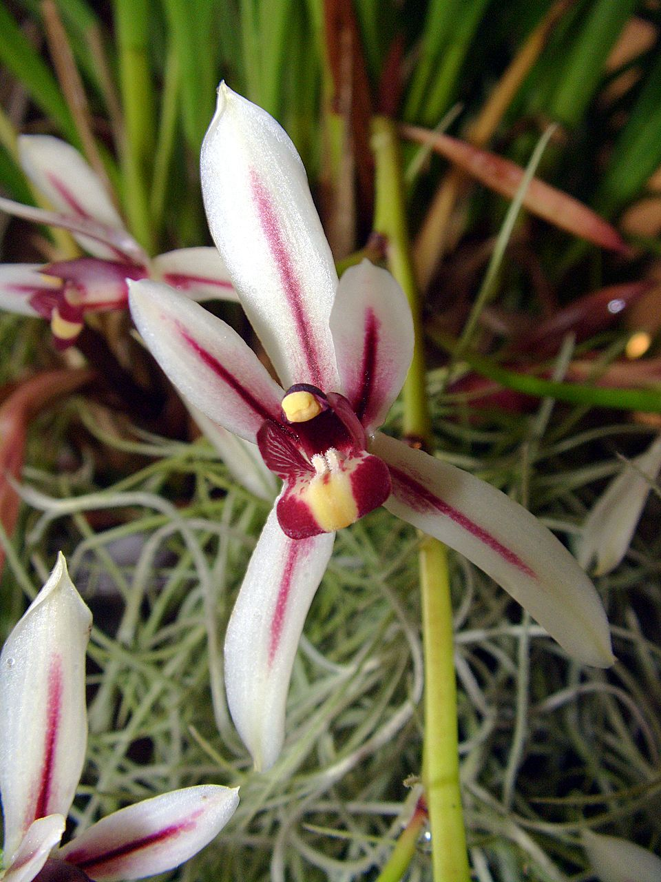 Cymbidium dayanum - flower